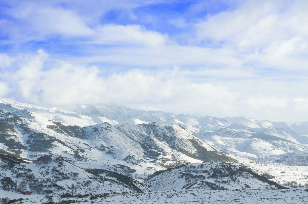 La comarca de Babia en invierno, nevada.